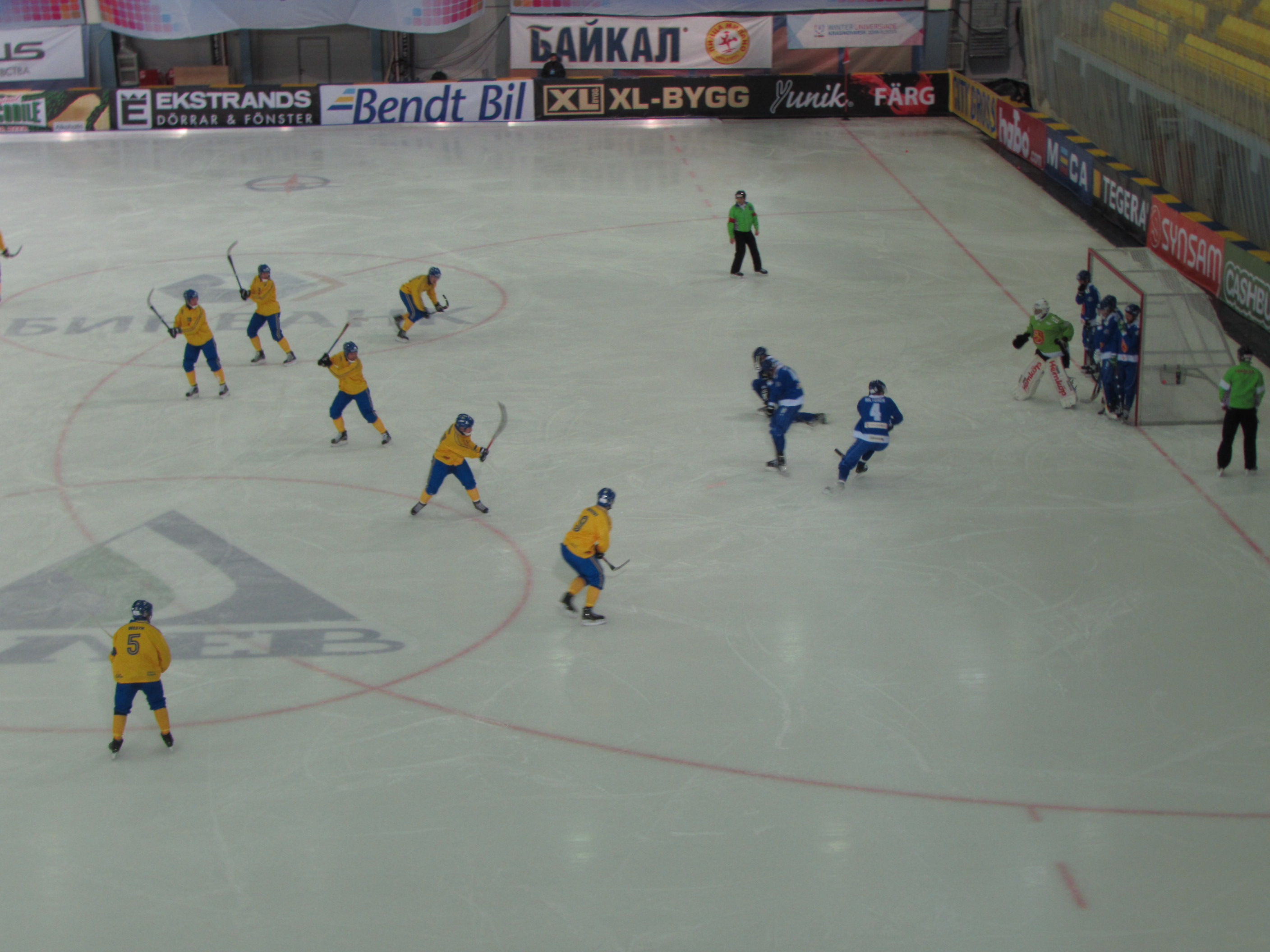 Півфінал Швеція – Фінляндія 2016 р.